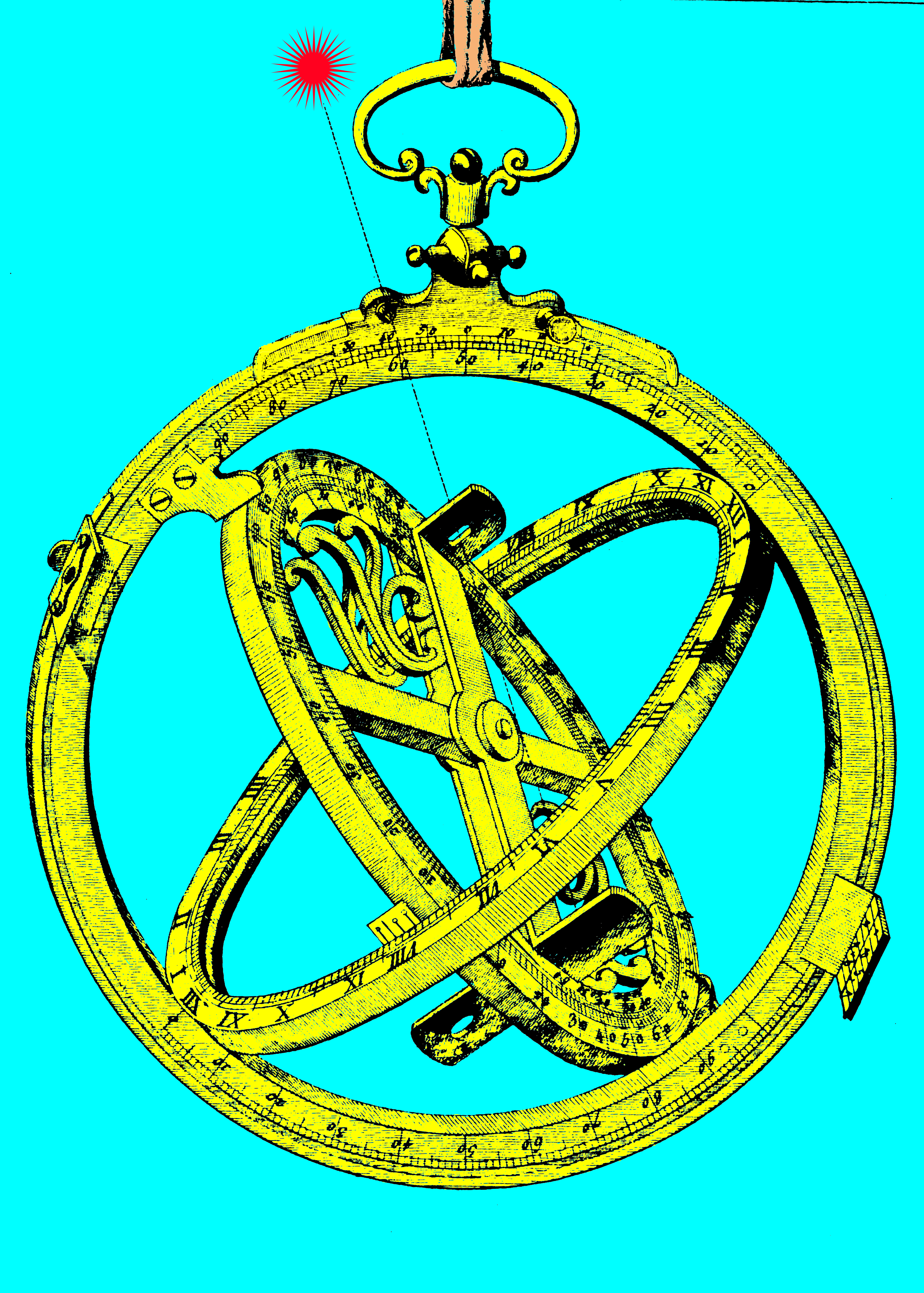 Anneau astronomique du cardinal de Luynes, signé Baradelle.